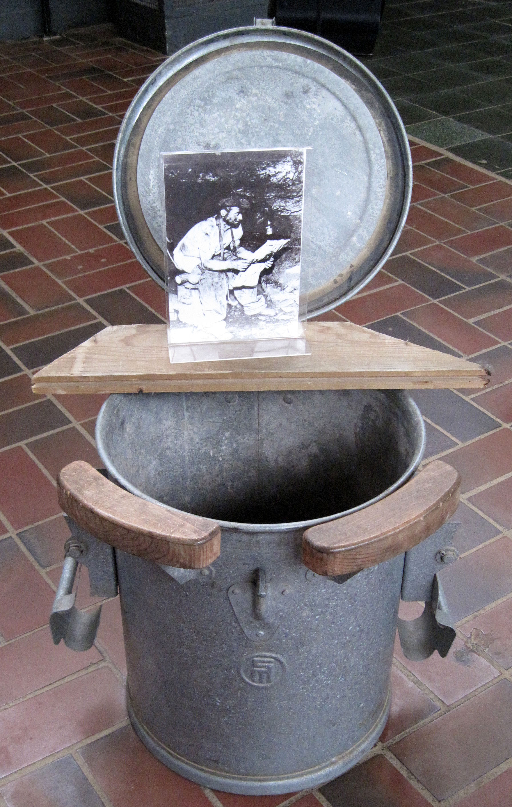 Ramsbeck, Bergbaumuseum, das stille Örtchen unter Tage